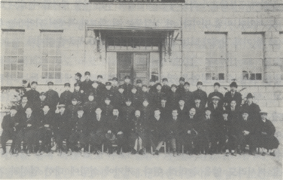 윤치호와 송도 고등학교 1923년 졸업생